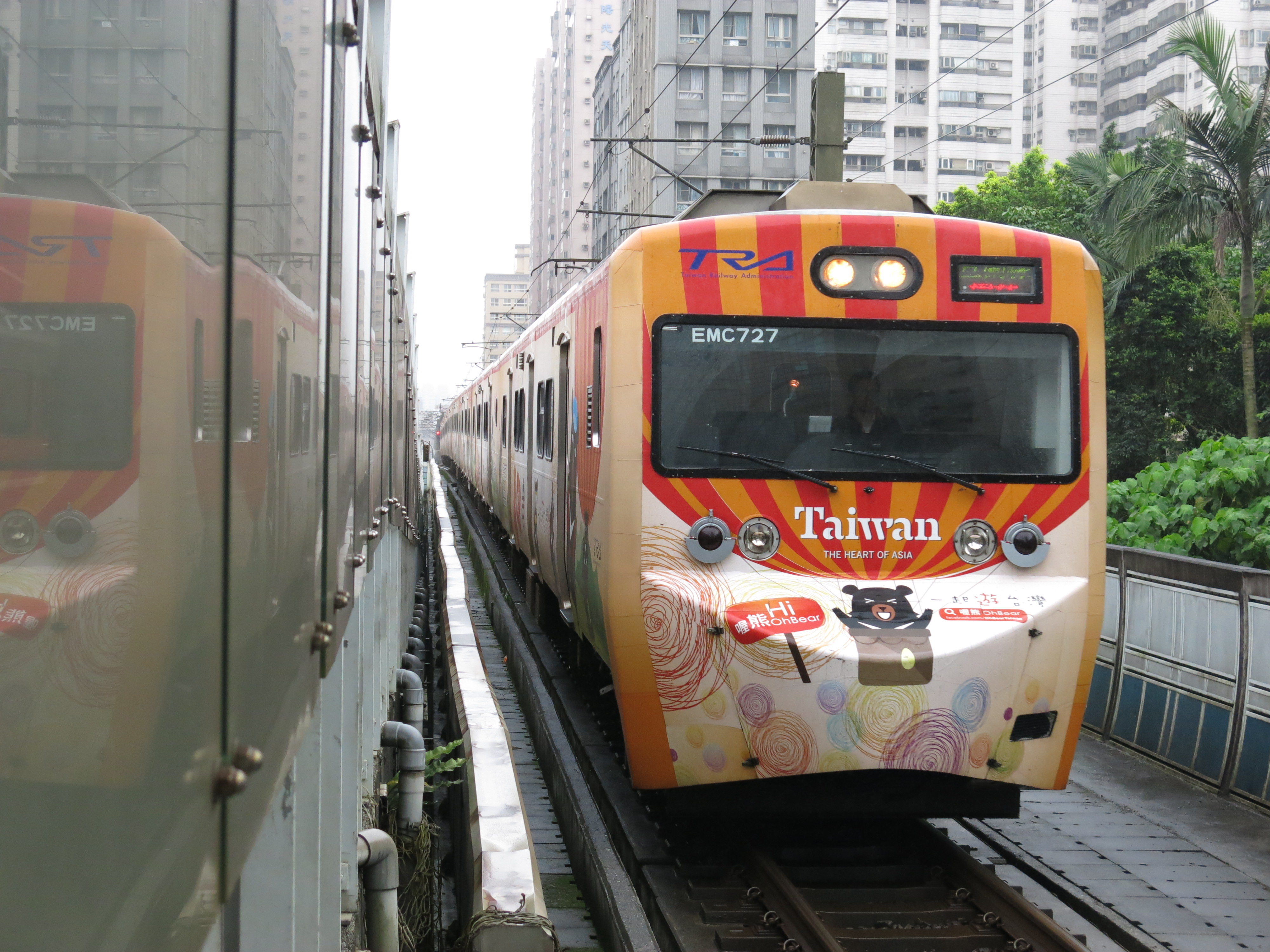 中文（台灣）: 台鐵EMU700型電聯車交通部觀光局喔熊彩繪車EMU727於汐科車站。